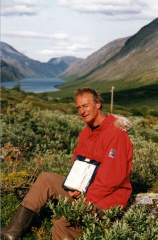 Roald Tvedt, Gjende painter